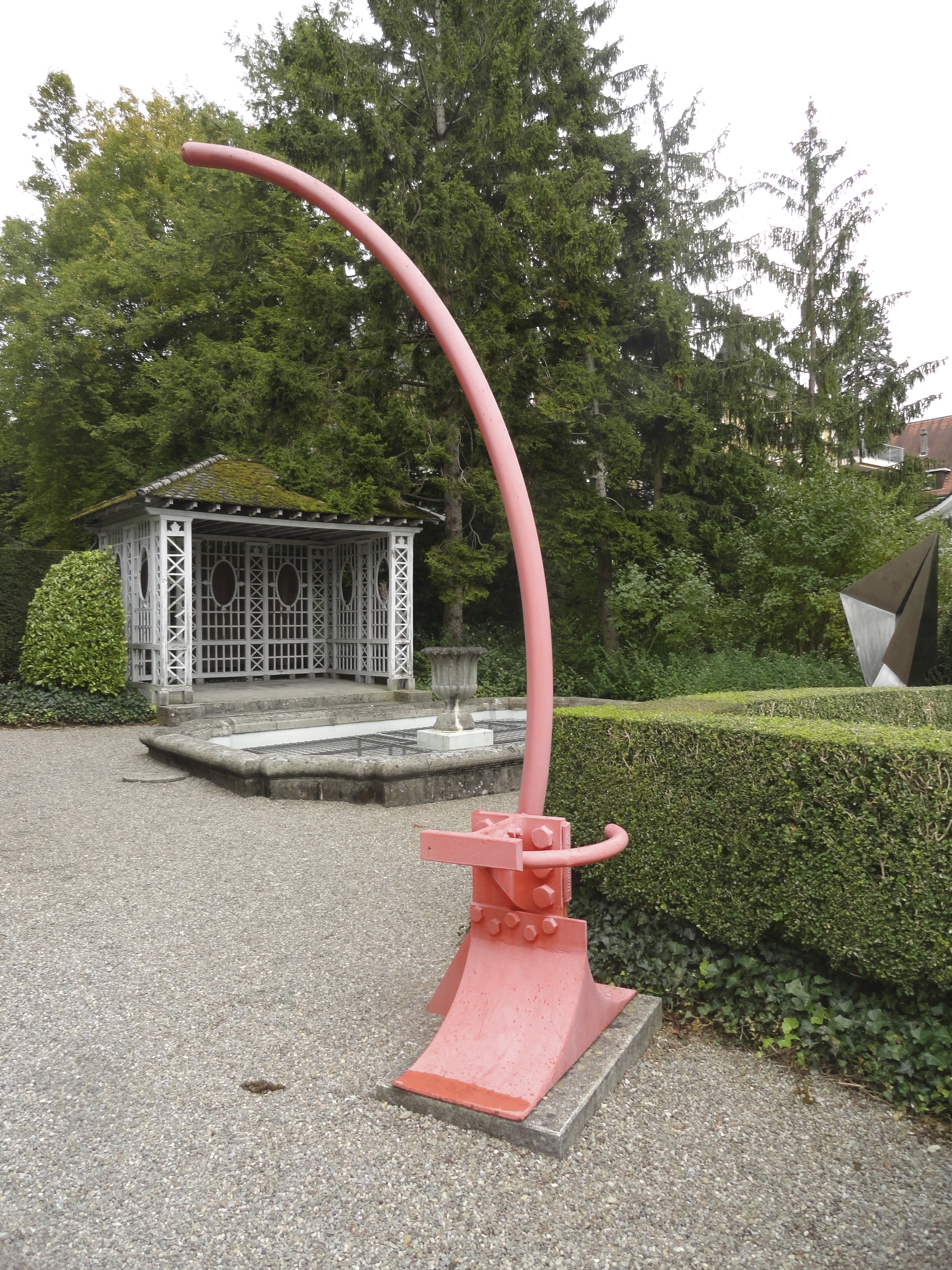 «Danielstengel» Eisenplastik von Bernhard Luginbühl, 1969. 335 cm hoch, Eisen, bemalt Park Villa Meier-Severini, Zollikon